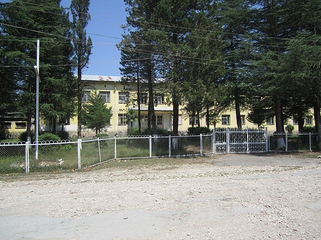 ქვემო ნაგვაზავოს საჯარო სკოლა